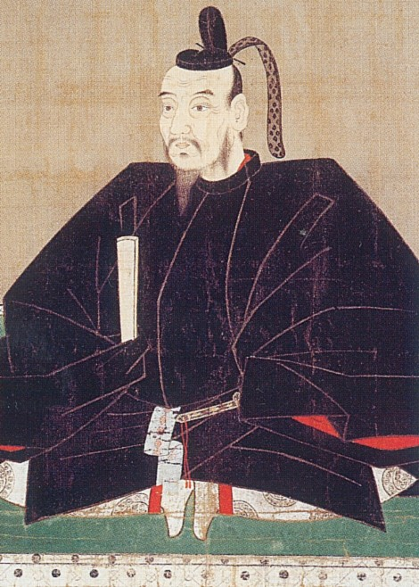 長宗我部元親。Chosokabe Mototika. 画名「絹本著色長宗我部元親像」